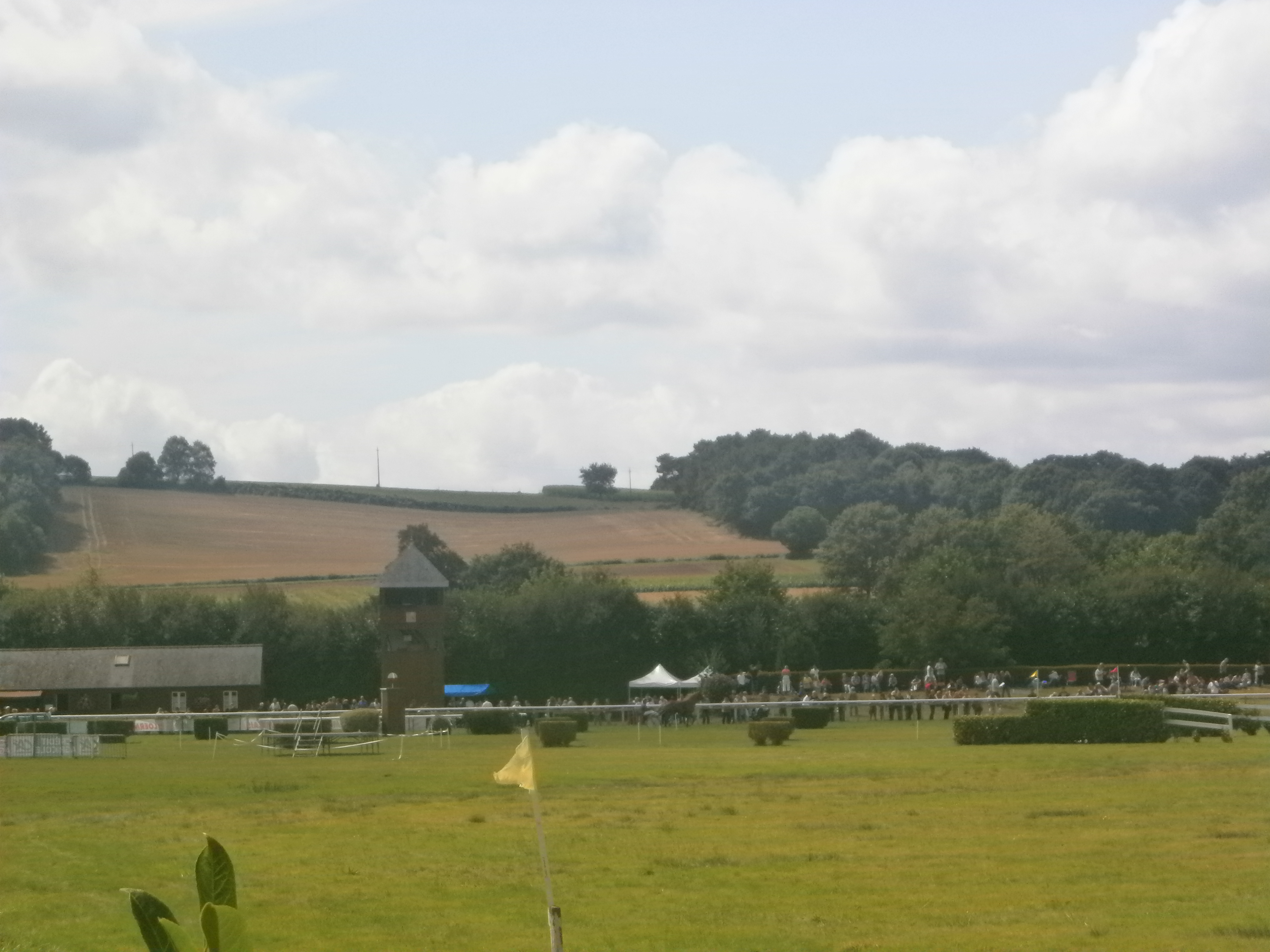 Hippodrome de Saint-Jean-des-Prés à Guillac près de Josselin (Bretagne, France). Vue générale